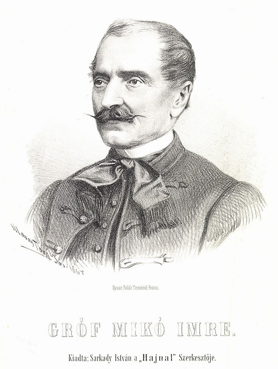 Hidvégi gróf Mikó Imre (Zabola, 1805. szeptember 4. – Kolozsvár, 1876. szeptember 16.) erdélyi magyar államférfi, művelődés- és gazdaságpolitikus, történész.